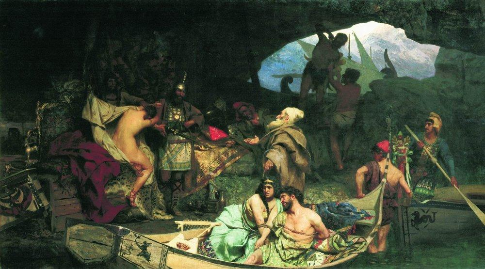 Corsars